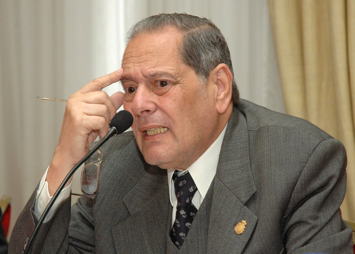 Luis Moisset de Espanés en Jujuy